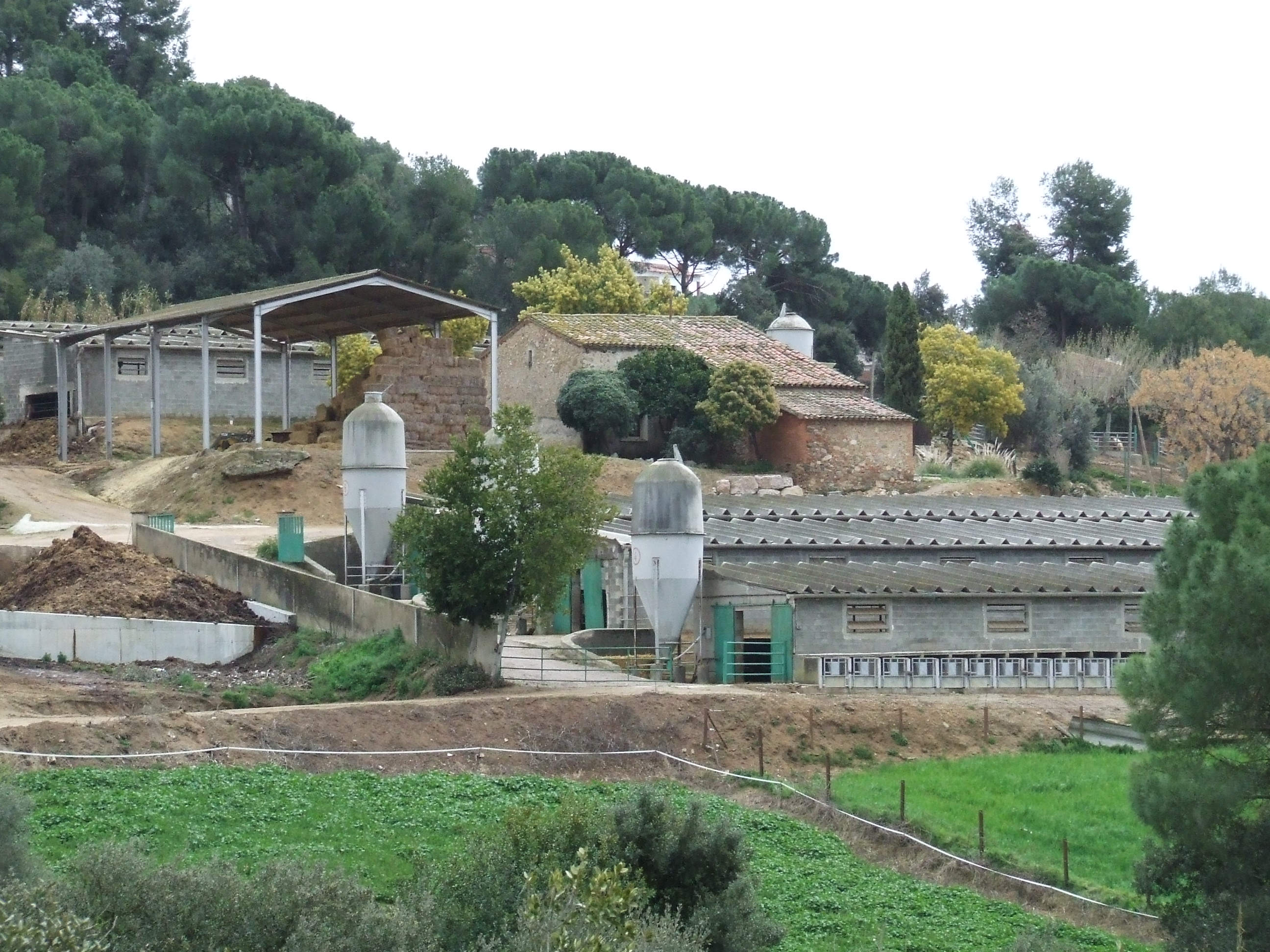 Can Pecador (Bigues, Bigues i Riells, Vallès Oriental)